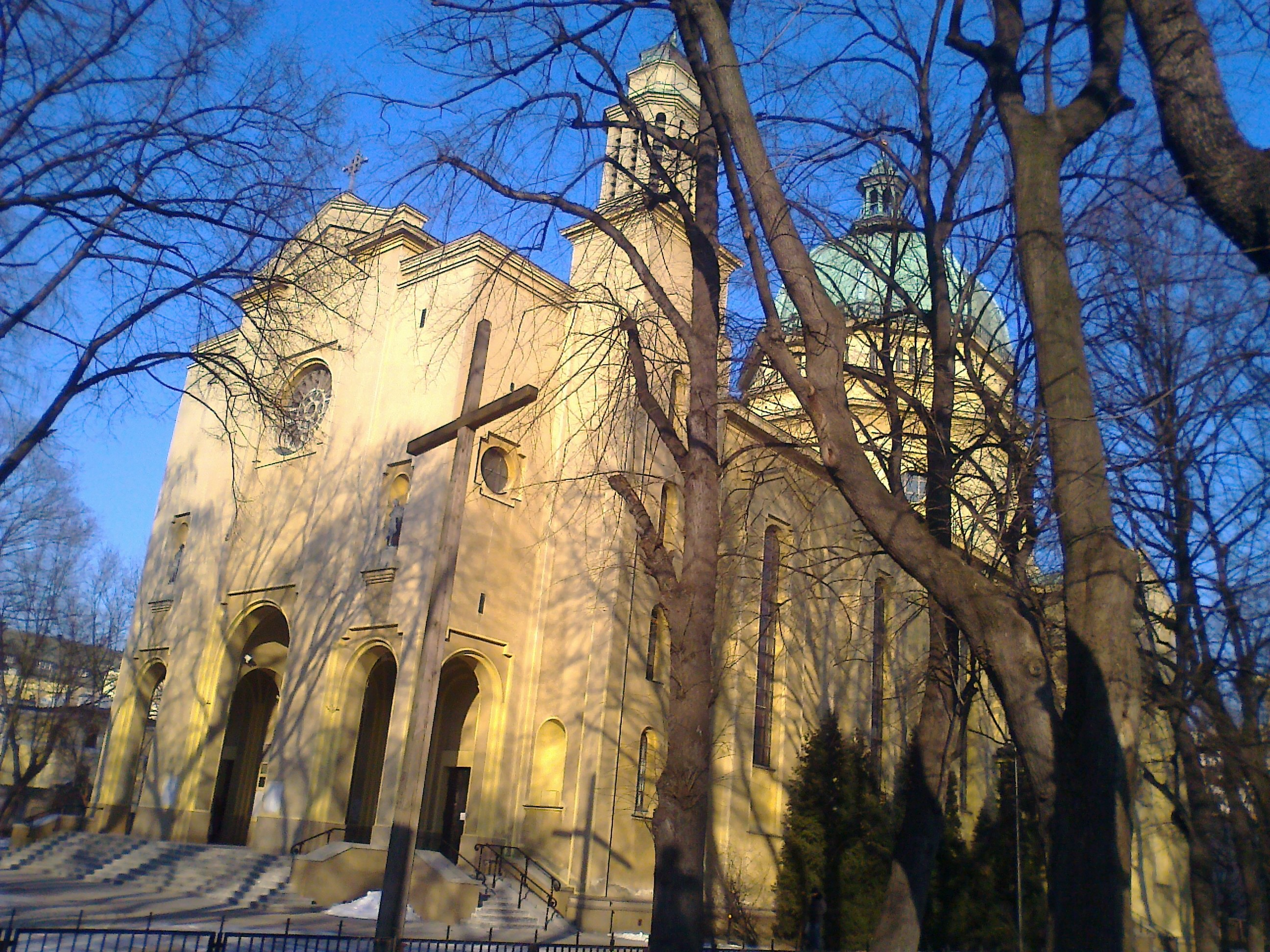 kościół Św. Apotołów Piotra i Pawła w Warszawie (parafia Św. Barbary)